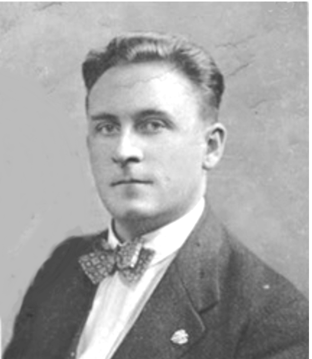 Francesco Illy születéskori nevén Illy Ferenc, (Temesvár, 1892. október 7. - Trieszt 1956.) magyar származású trieszti üzletember, könyvelő, feltaláló.